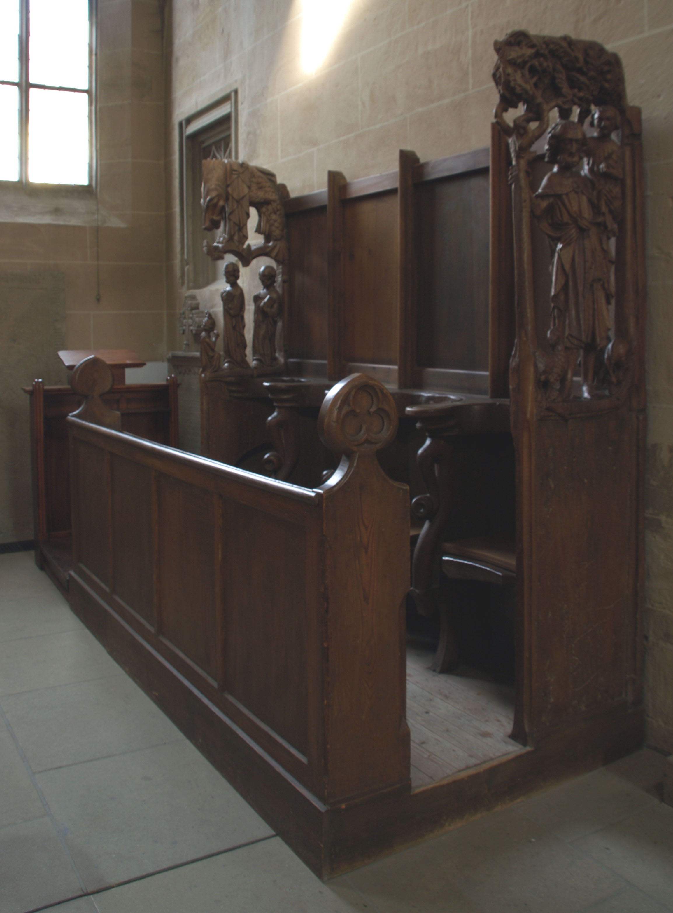 4-sitziger gotischer Chorstuhl aus dem 14. Jahrhundert in der Markgröninger Bartholomäuskirche. Motiv an der rechten Seitenwange: Christus mit einem Buch in der Hand wie er vom heiligen Christopherus durch einen Fluss getragen wird; Motiv an der linken Seitenwange: Petrus und Paulus (die einstigen Kirchenpatronen der Bartholomäuskirche). Über ihnen beiden ein Ungetüm mit Eberkopf, Hundebeinen, hinteren Schwimmfüssen, Flossen und Fischschwanz. Vor ihnen Kniend eine nicht identifizierte Person (vielleicht der Stifter Graf Hartmann von Grüningen, ein Bettler, ein Büßer, ein Pilger?).